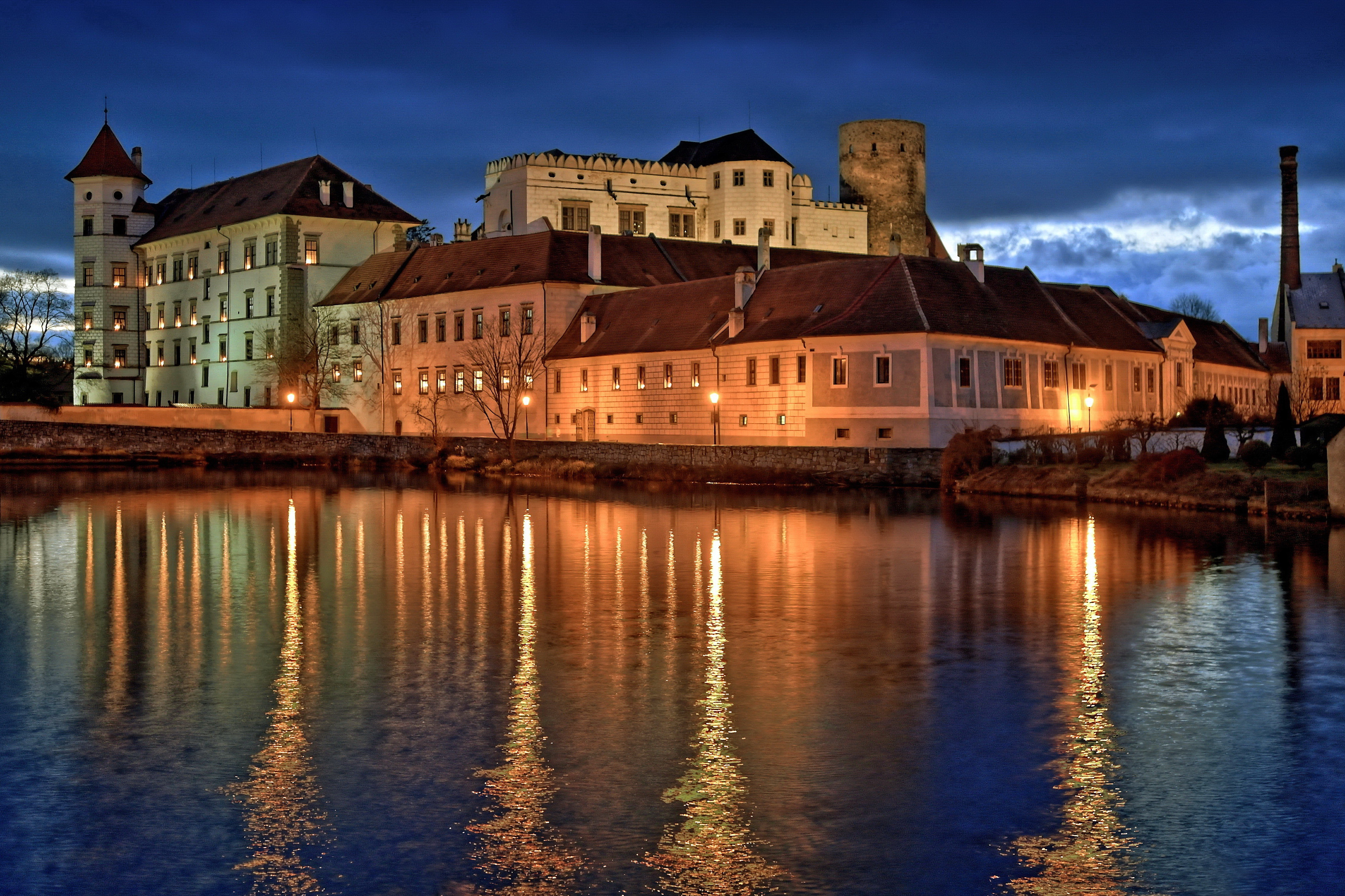 Zámek Jindřichův Hradec, Dobrovského 1, Jindřichův Hradec I, Jindřichův Hradec.